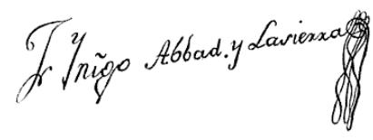 Firma de Íñigo Abbad y Lasierra